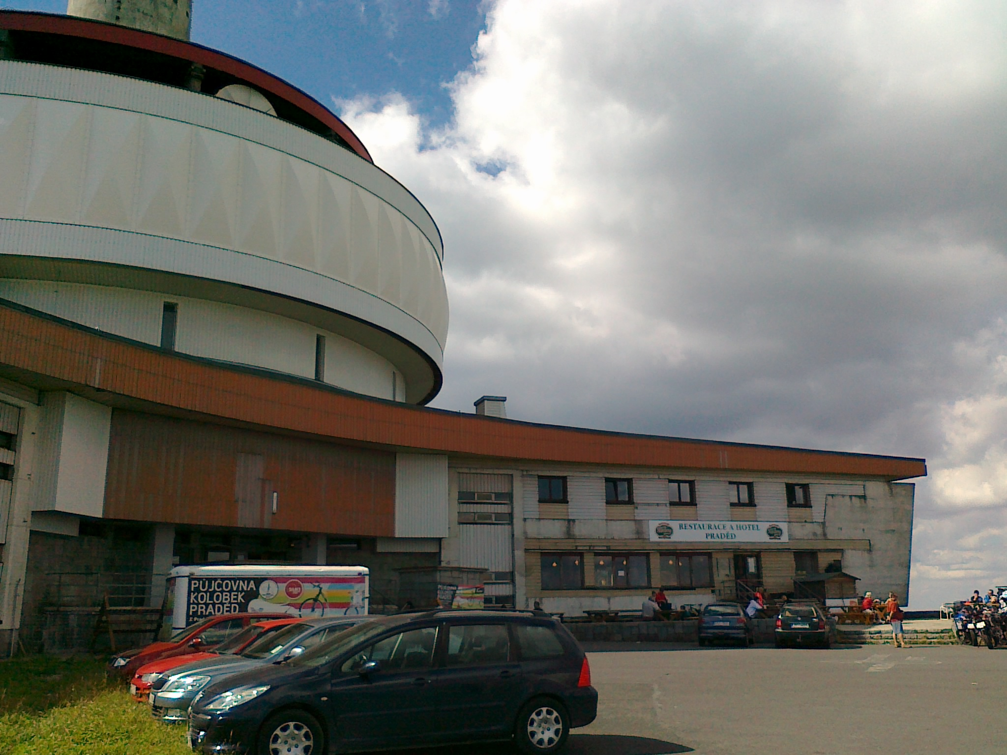 Widok na restaurację i hotel Praděd na wieży góry Praděd - 1491 m